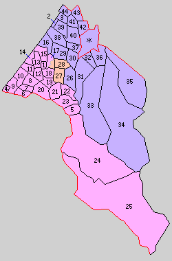 石川県石川郡の町村制施行時の町村。